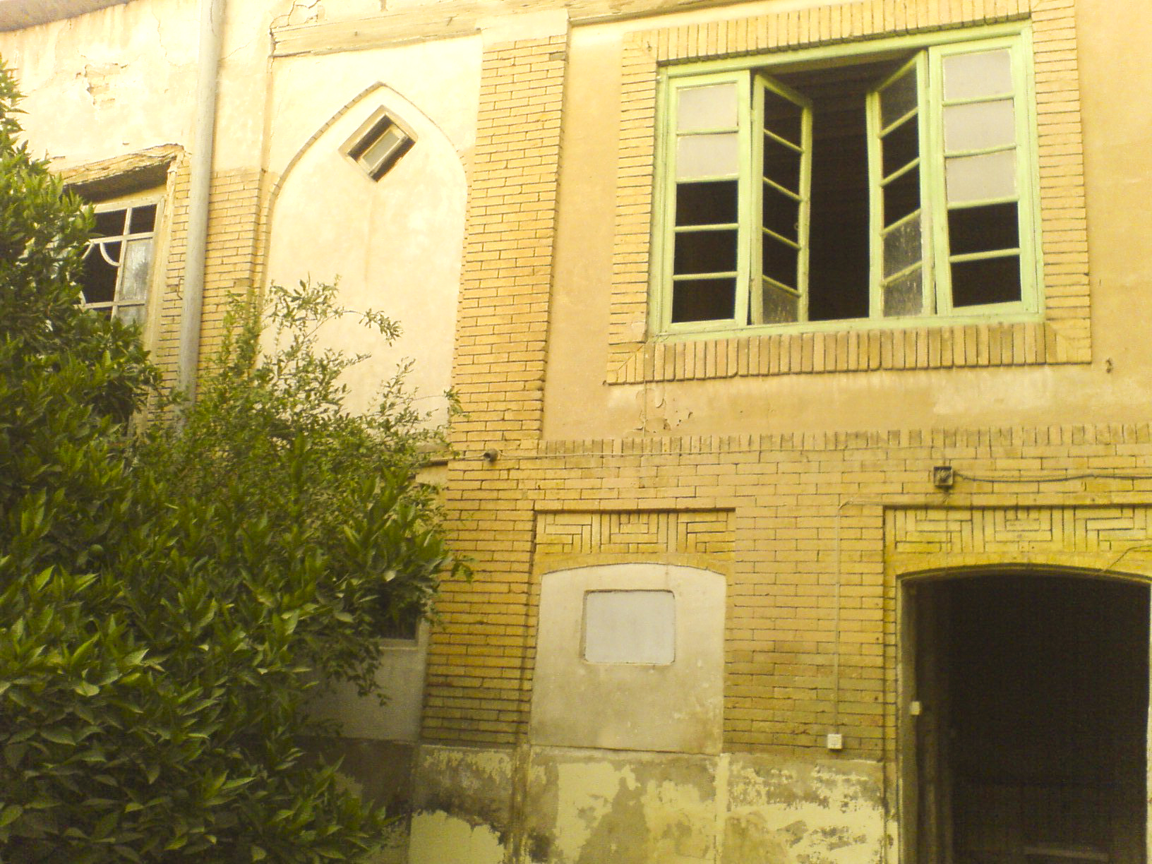 پنجره های قدیمی